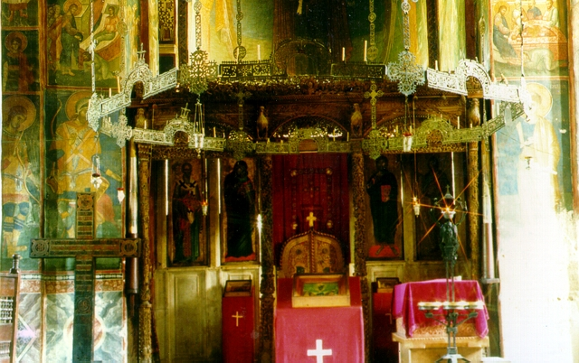 Innere des Klosters Visoki Decani. Die Ikonostase aus dem 14 Jh. hat vier große Ikonen.